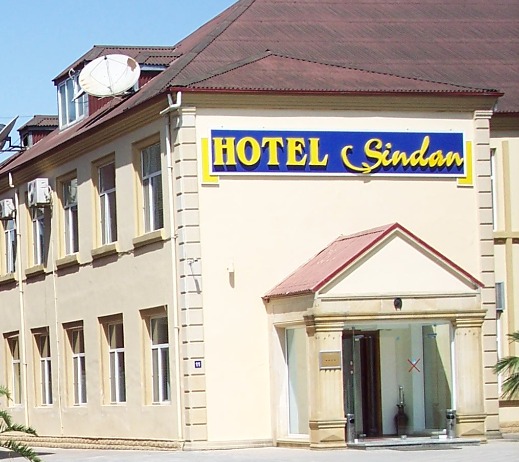 четырехзвездочный отель Шиндан в Астаре